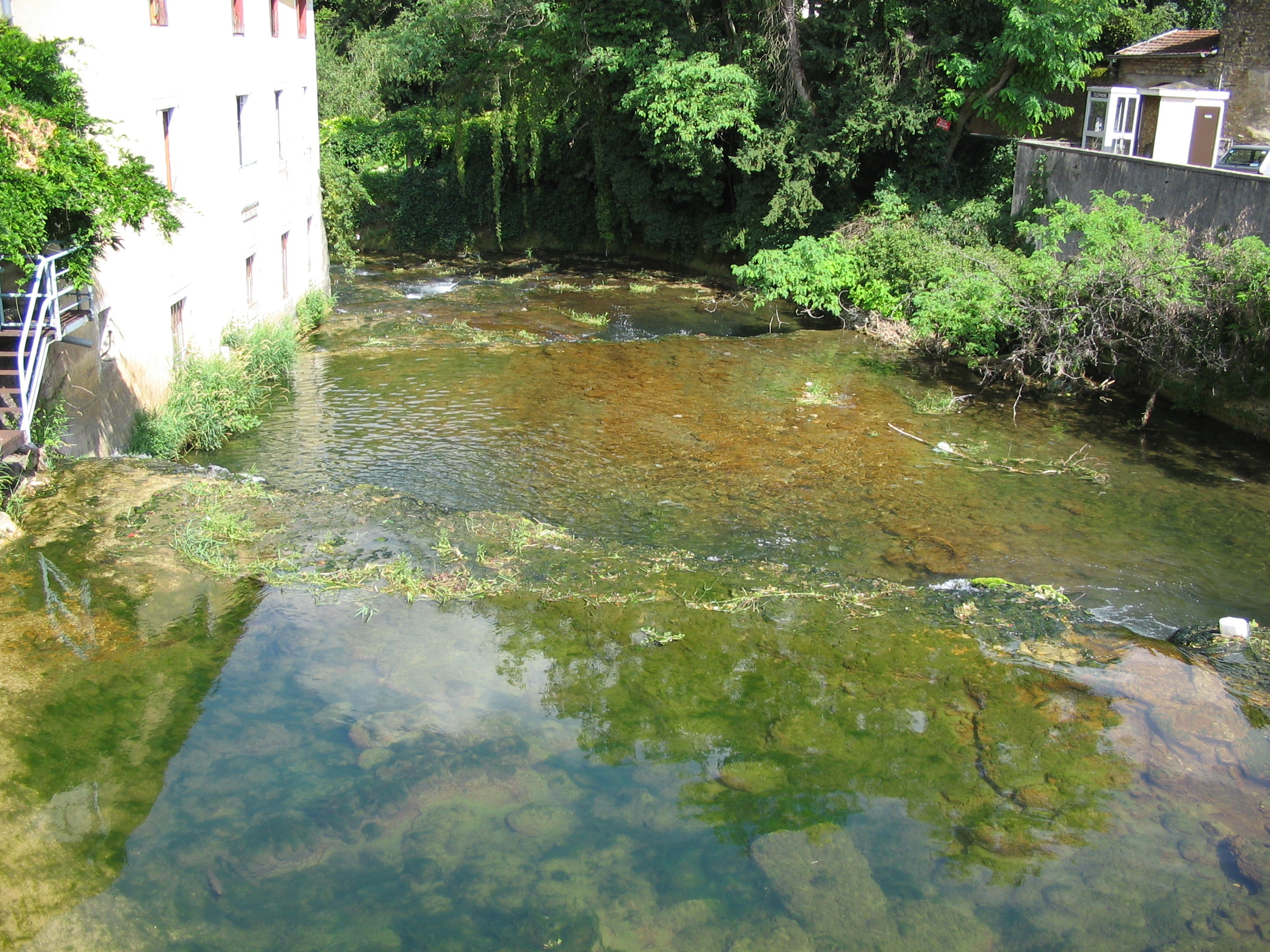 self made